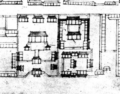 乾隆十五年（1750年）完成的《乾隆京城全图》中的大慈延福宫。本图来自清內務府藏京城全圖，故宮博物院影印，民國二十九年十二月（1940年）。